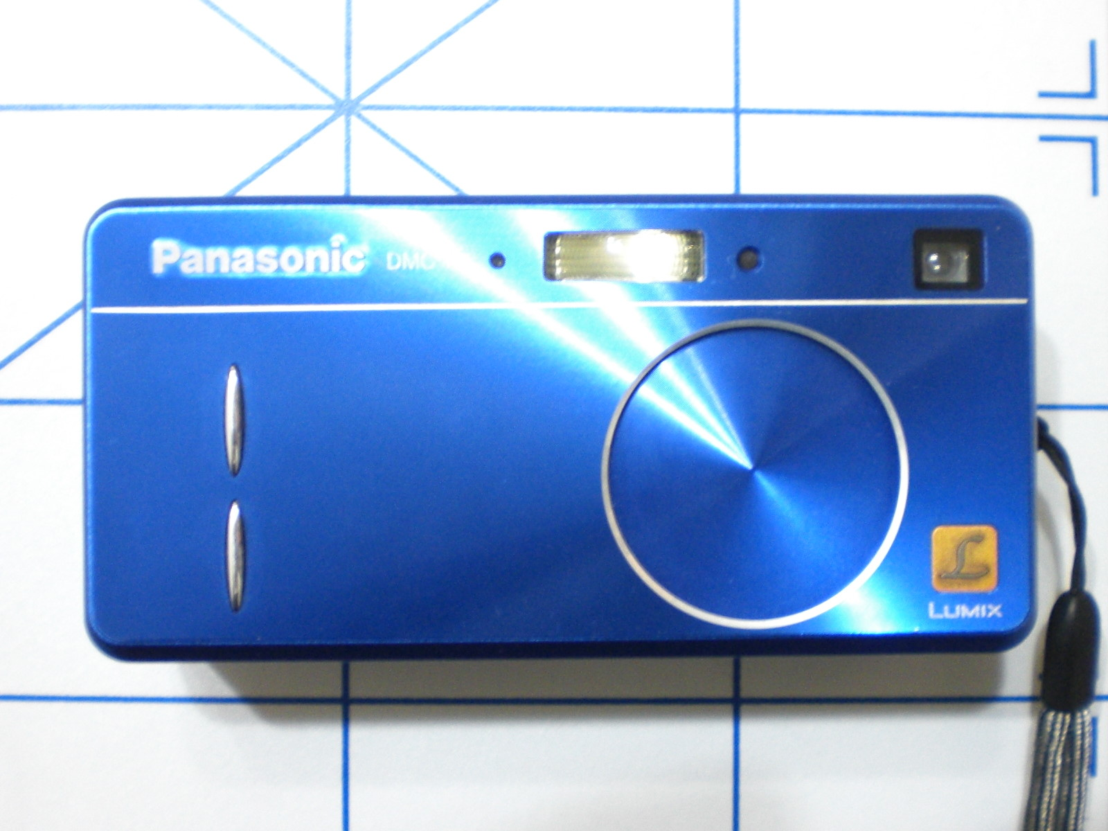 Panasonic Lumix DMC-F1數位相機正面